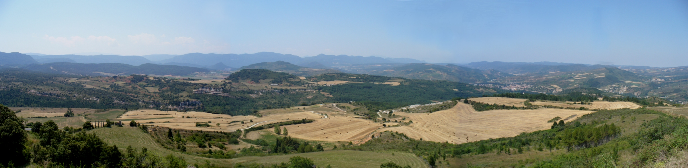 Panorama in Rennes-le-Chateau